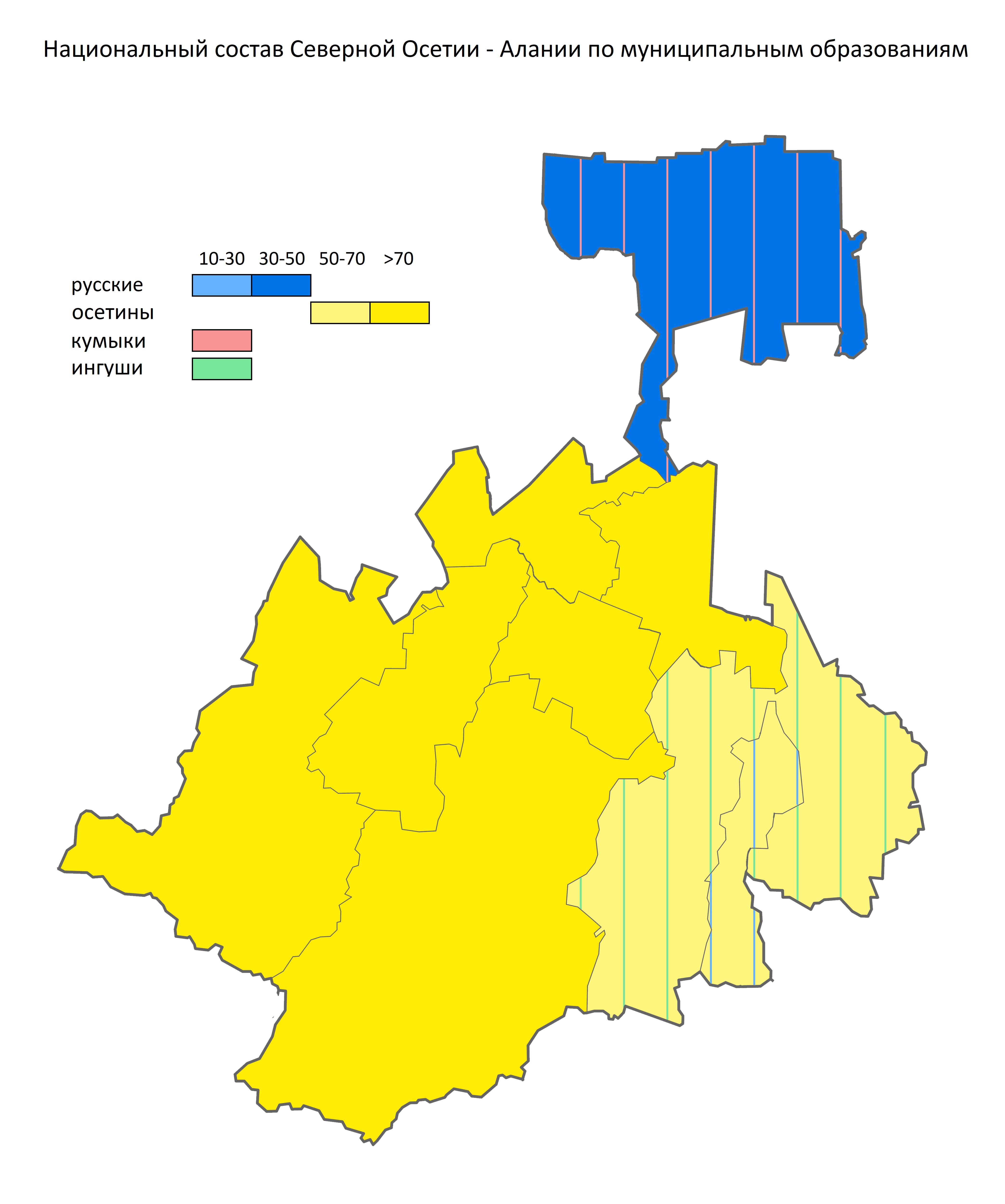 Население Северной Осетии - Алании по муниципальным образованиям по данным переписи населения 2010 г.